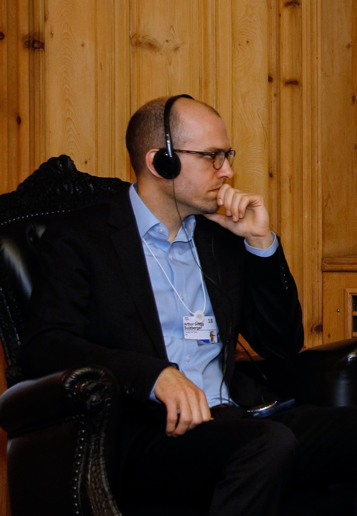 (Davos - Suíça, 24/01/2018) Entrevista a Arthur Gregg Sulzberger e Joe Kahn, New York Times.Foto: Beto Barata/PR